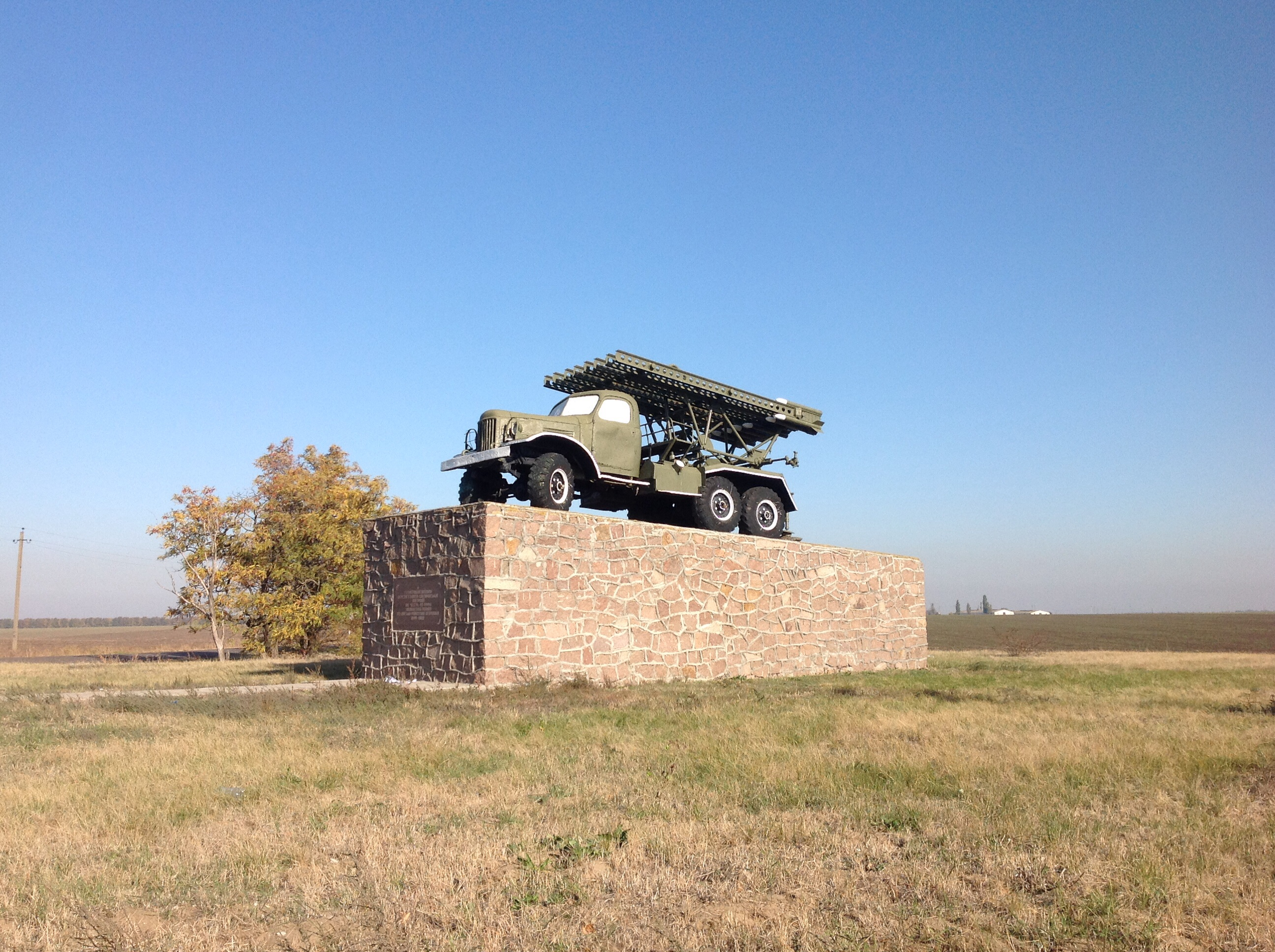 Пам'ятний знак на честь завершення Безезнегувато-Снігурівської операції (6-18 березня 1944 р.), Березнегувате